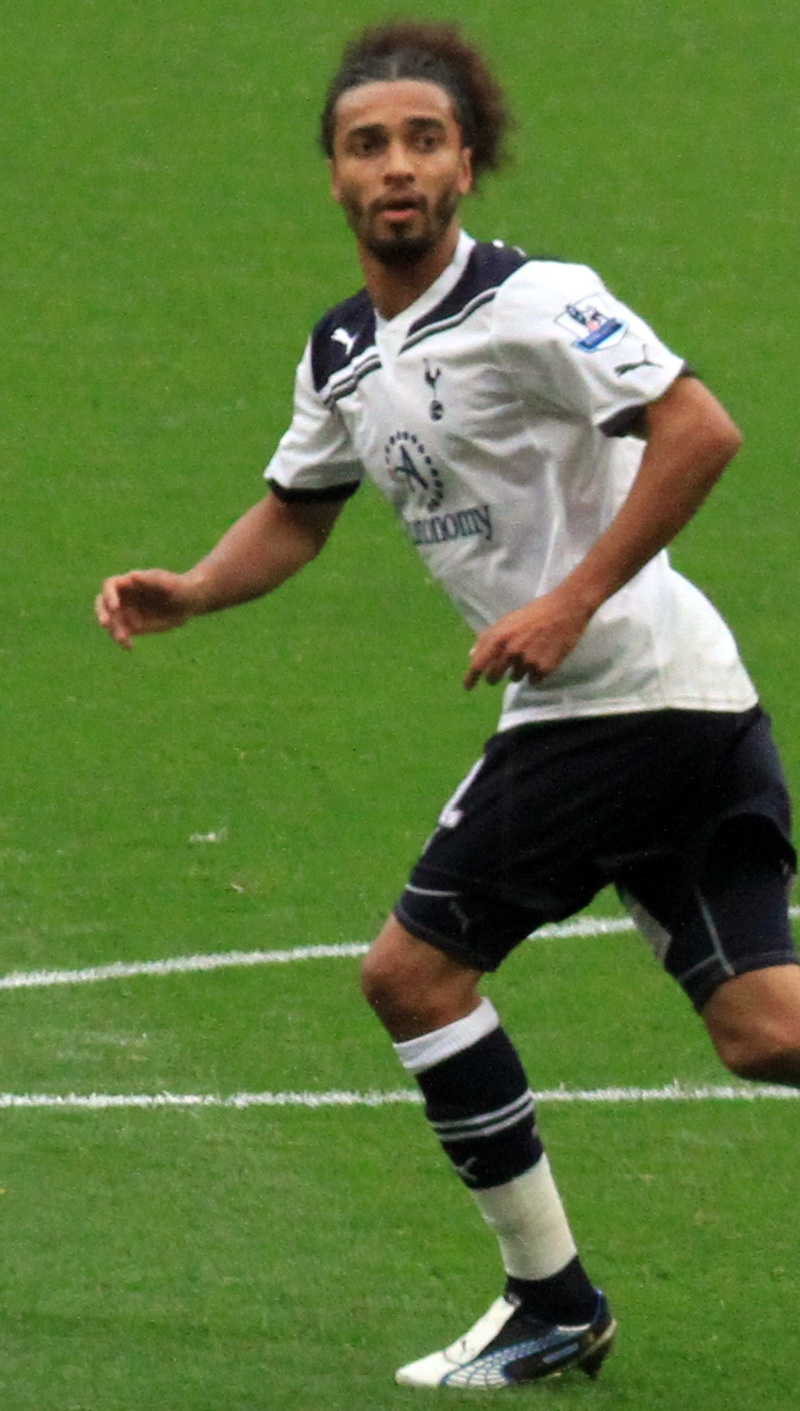 Assou-Ekotto face à Arsenal